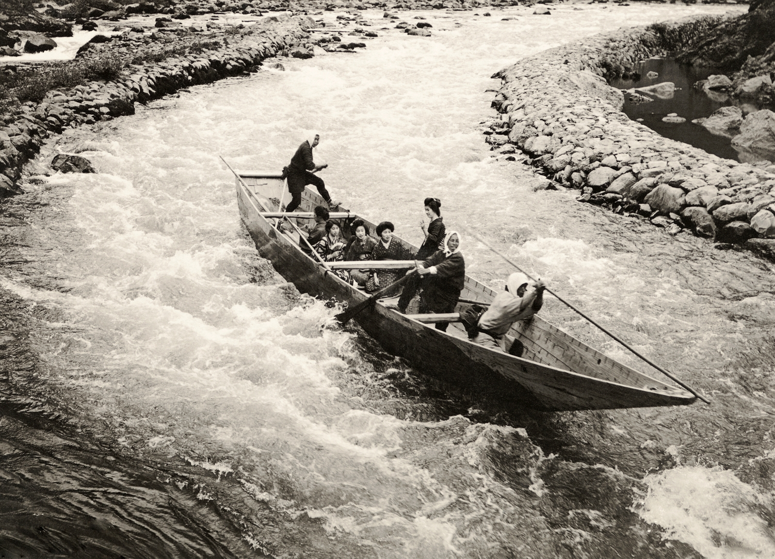 1921 Japonya